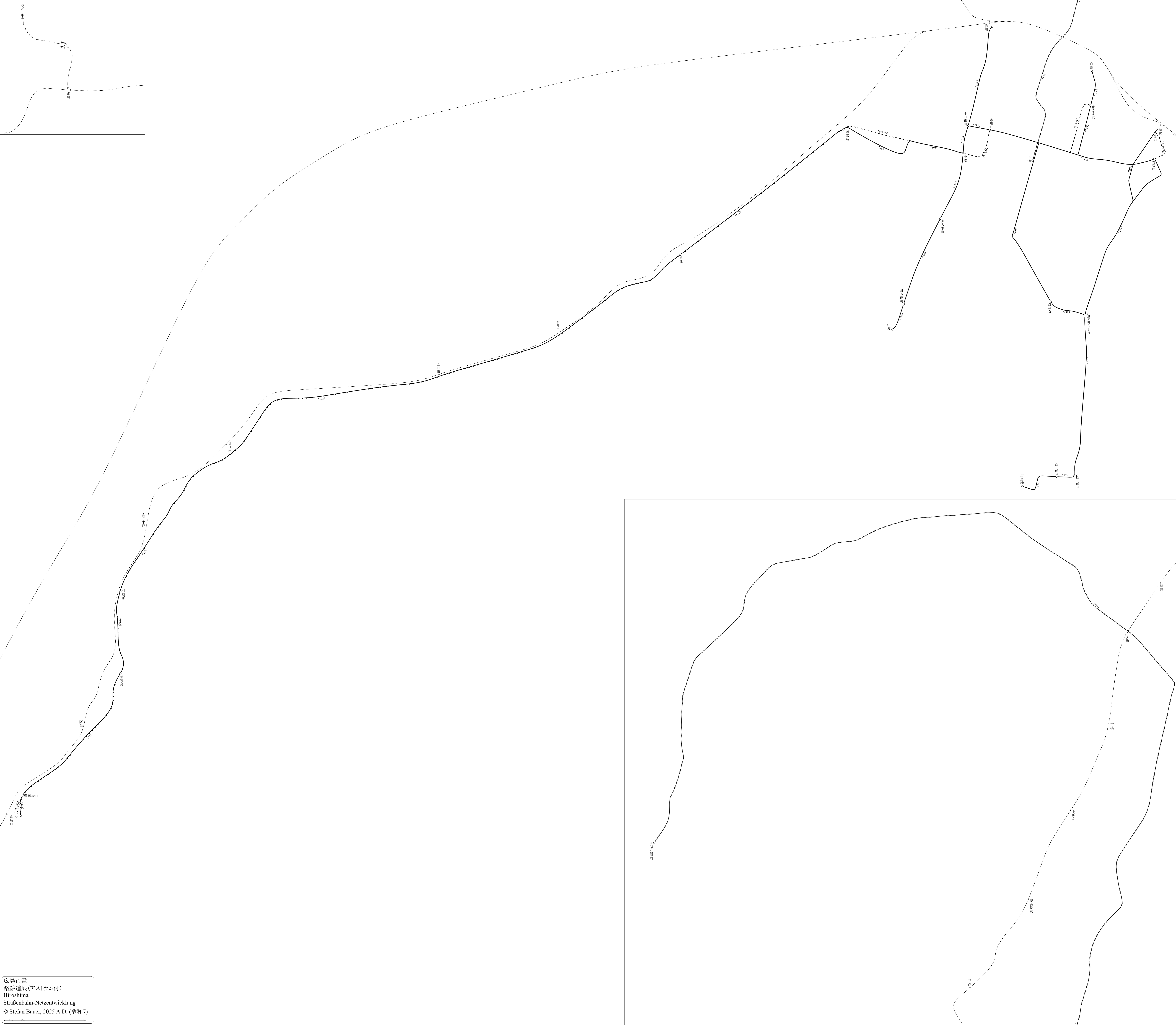 広島市電の路線進展図(アストラム付)